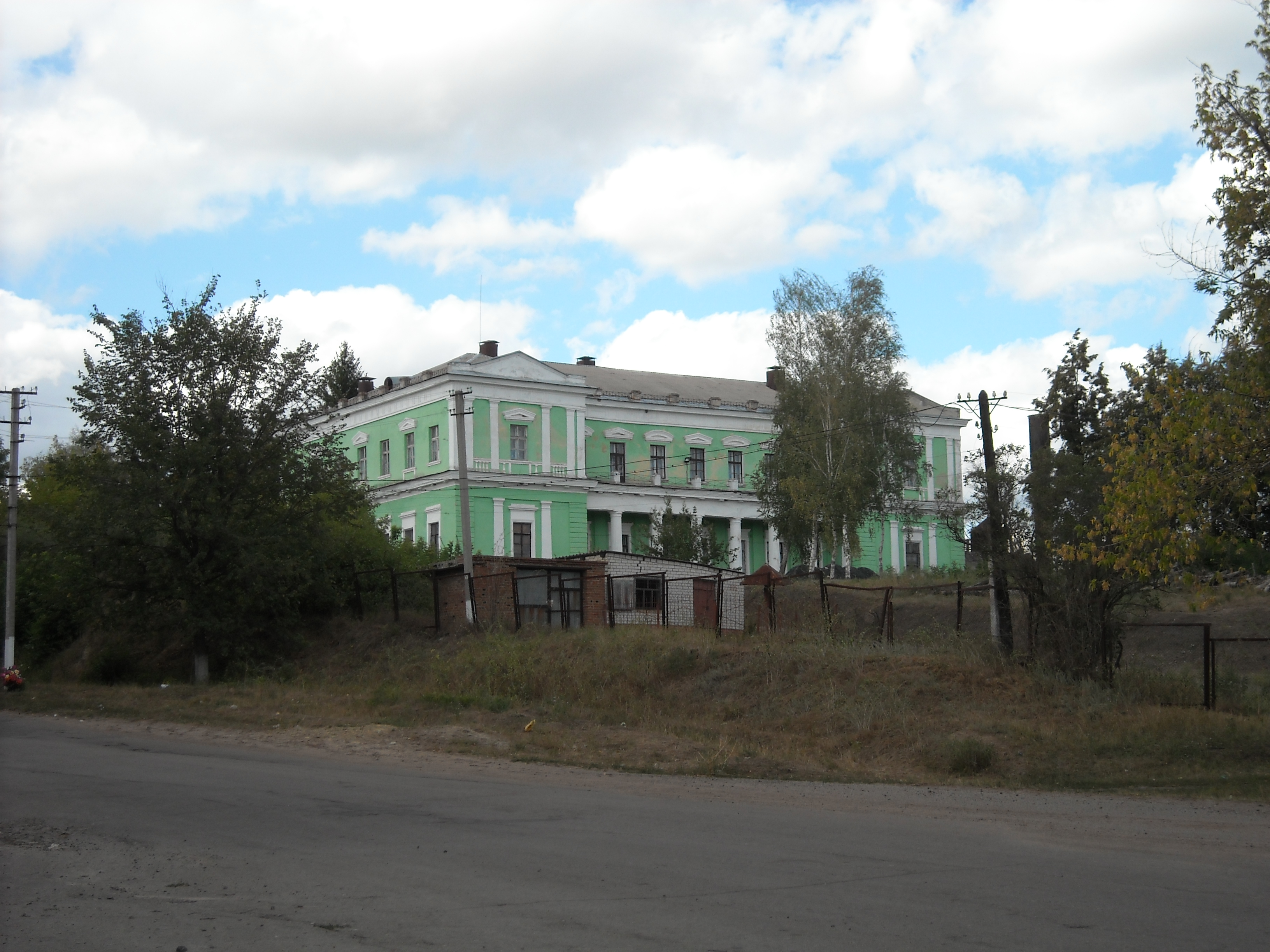 Україна. Харківська область. Нововодолазький район. Рокитне. Маєток Куликовських (XIX сторіччя).